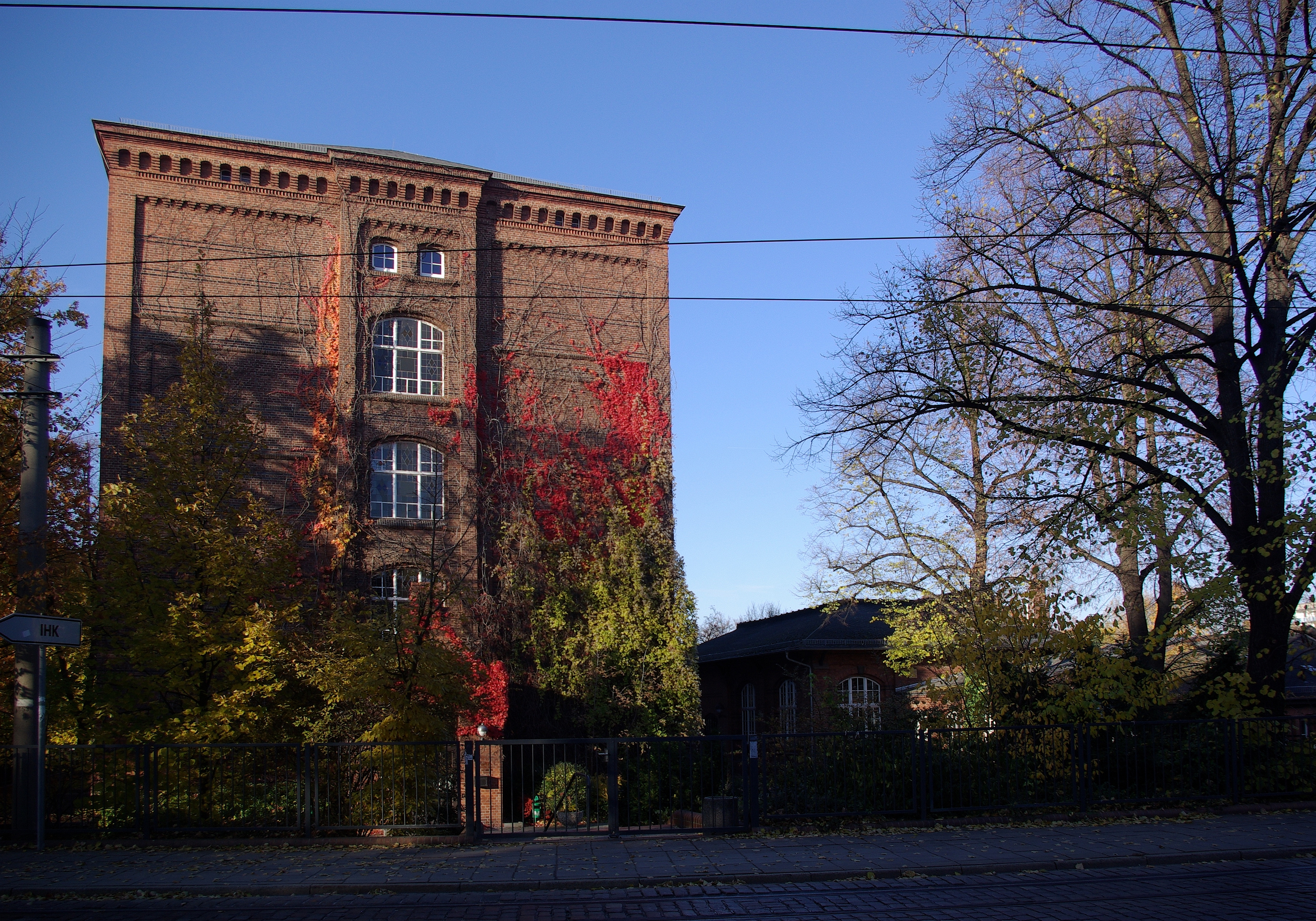 Cottbus in Brandenburg. Die Schule in der Sandower Straße 19 steht mit der Turnhalle unter Denkmalschutz.